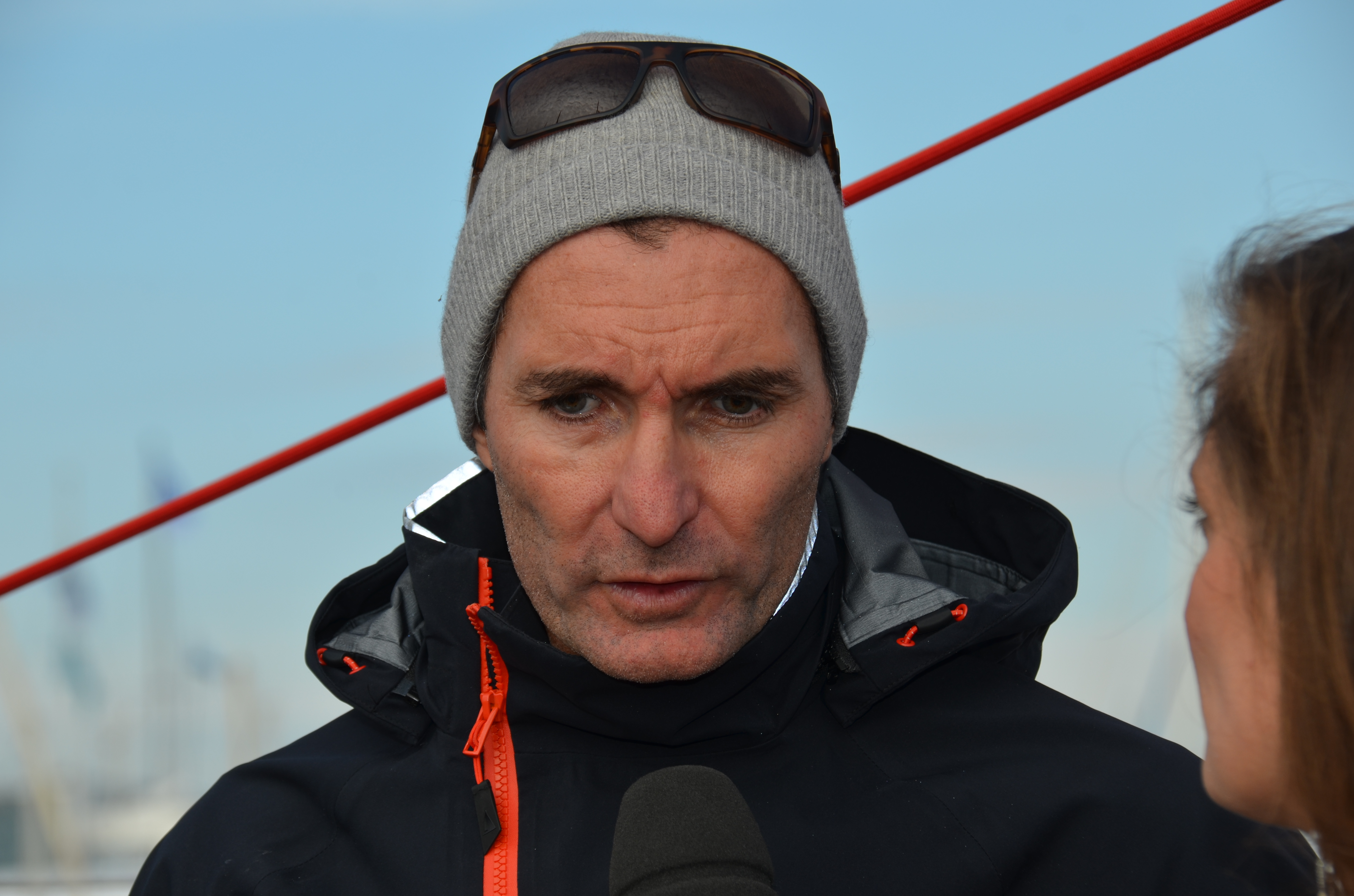 Jérémie Beyou au départ du Vendée Globe 2016-2017